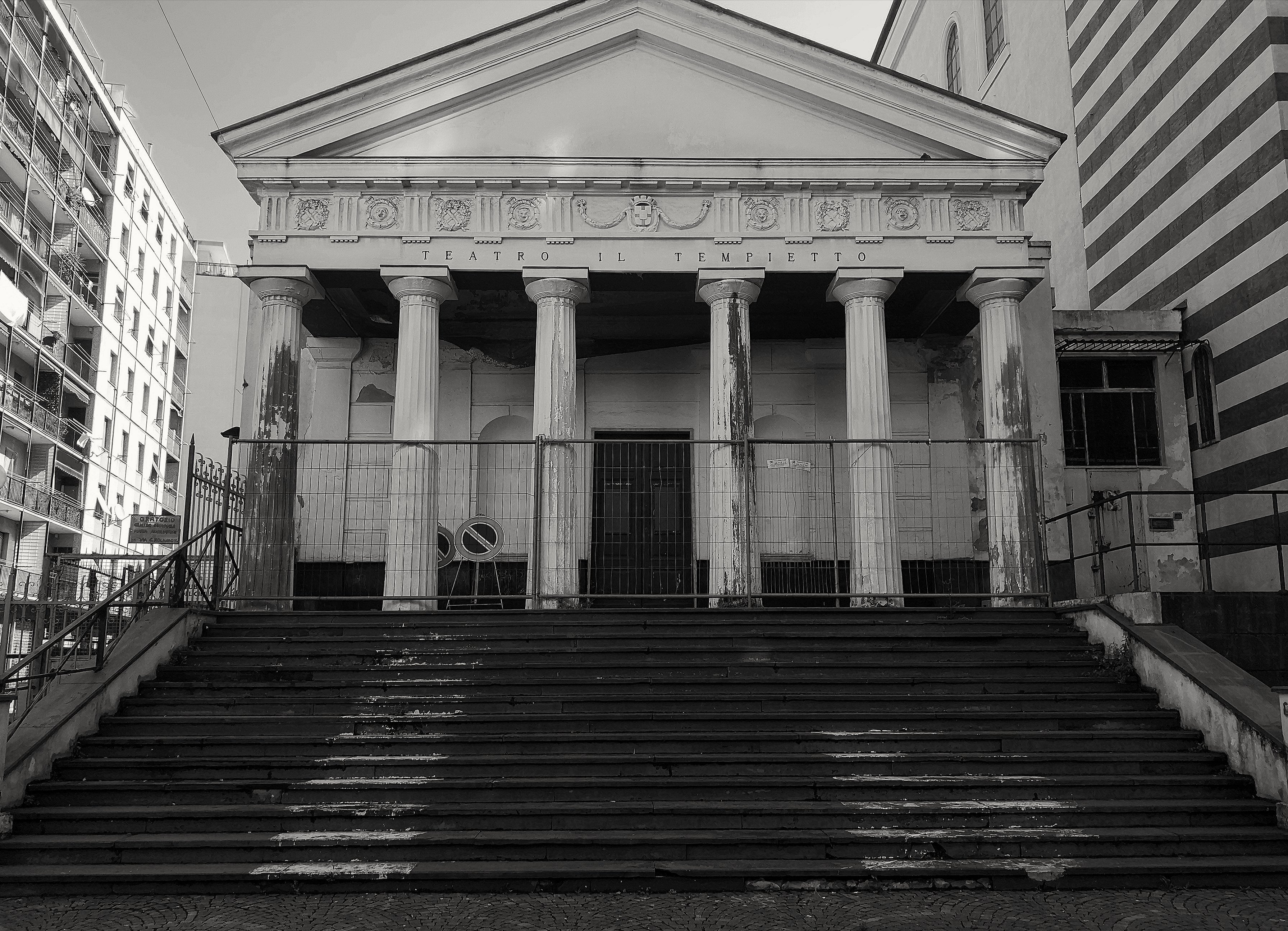 Il Tempietto This is a photo of a monument which is part of cultural heritage of Italy.